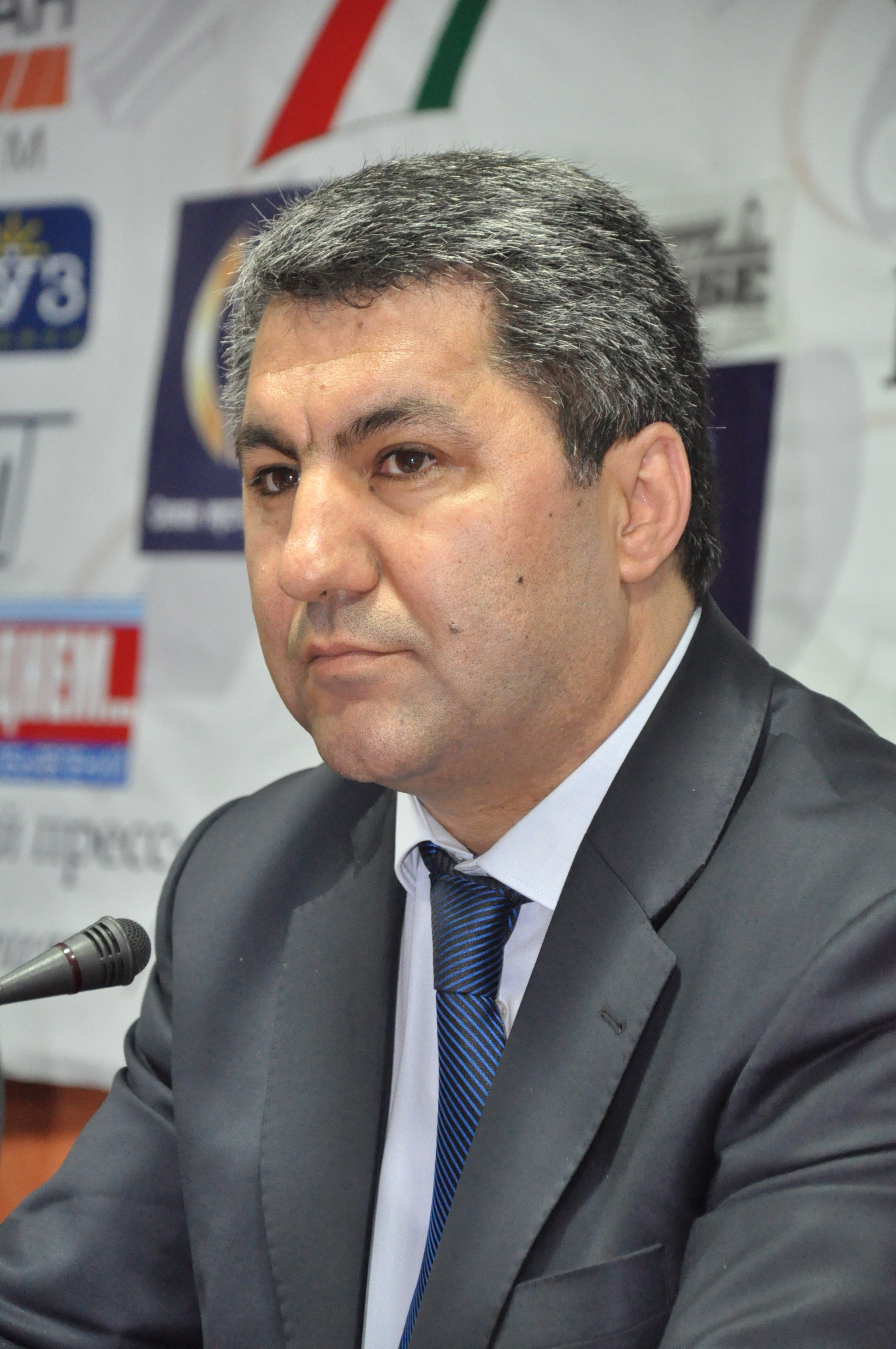 Тоҷикӣ: Муҳиддин Кабирӣ